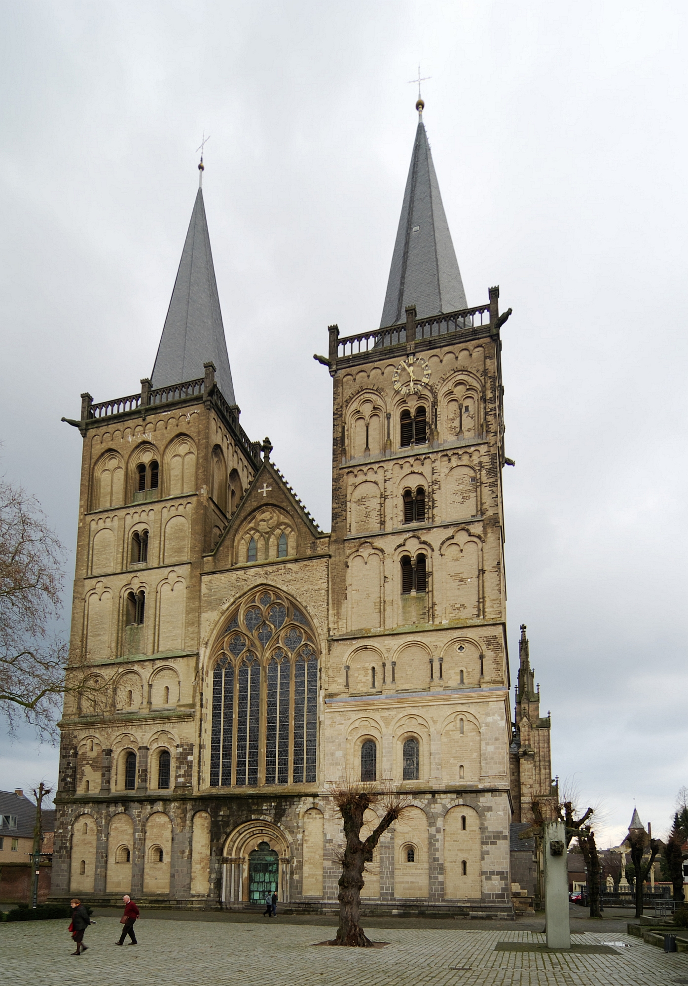 Xantener Dom